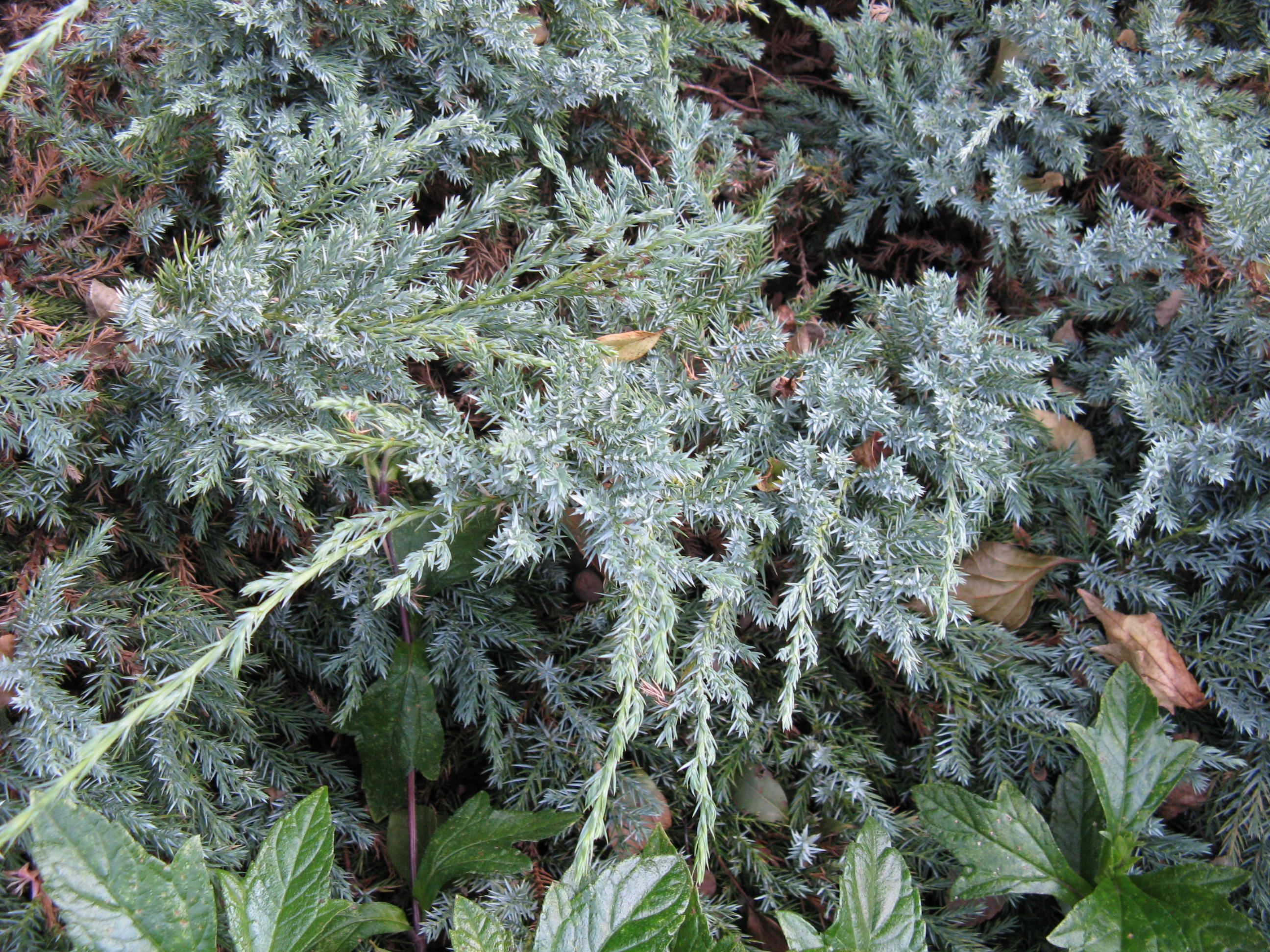 Juniperus squamata 'Blue Carpet'